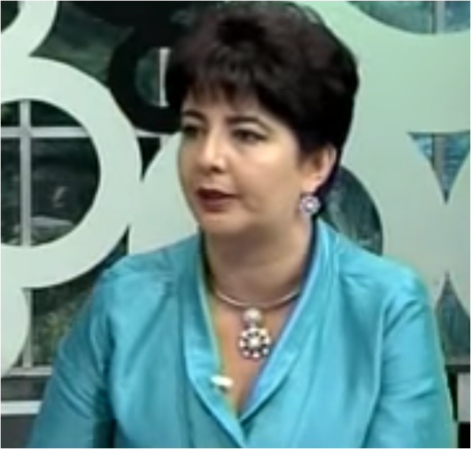 Paola Barriga en junio de 2015